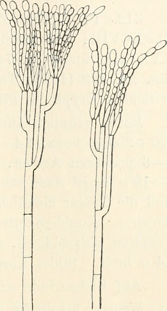 Penicillium italicum Wehm. Konidienträger. Yergr. 400. (Nach Wehmer.)